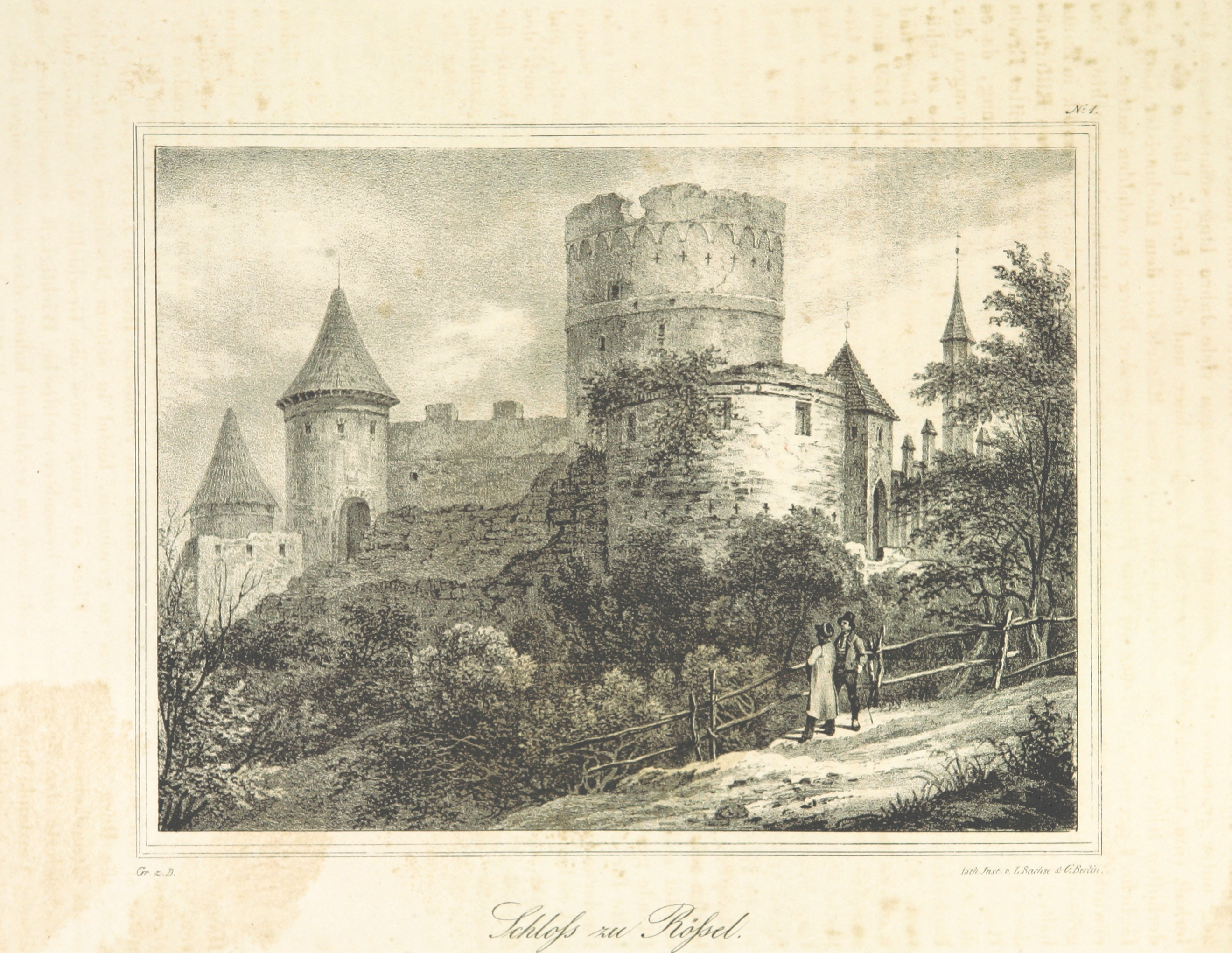 Zamek biskupi w Reszlu